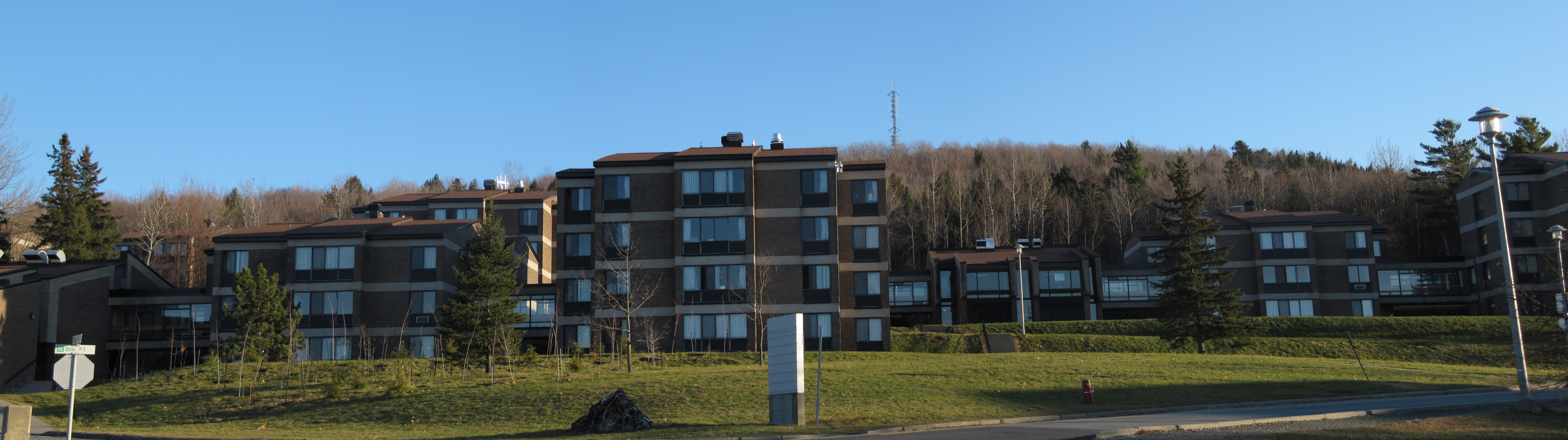 Résidences G8 à G15 de l'Université de Sherbrooke, au pied du mont Bellevue.